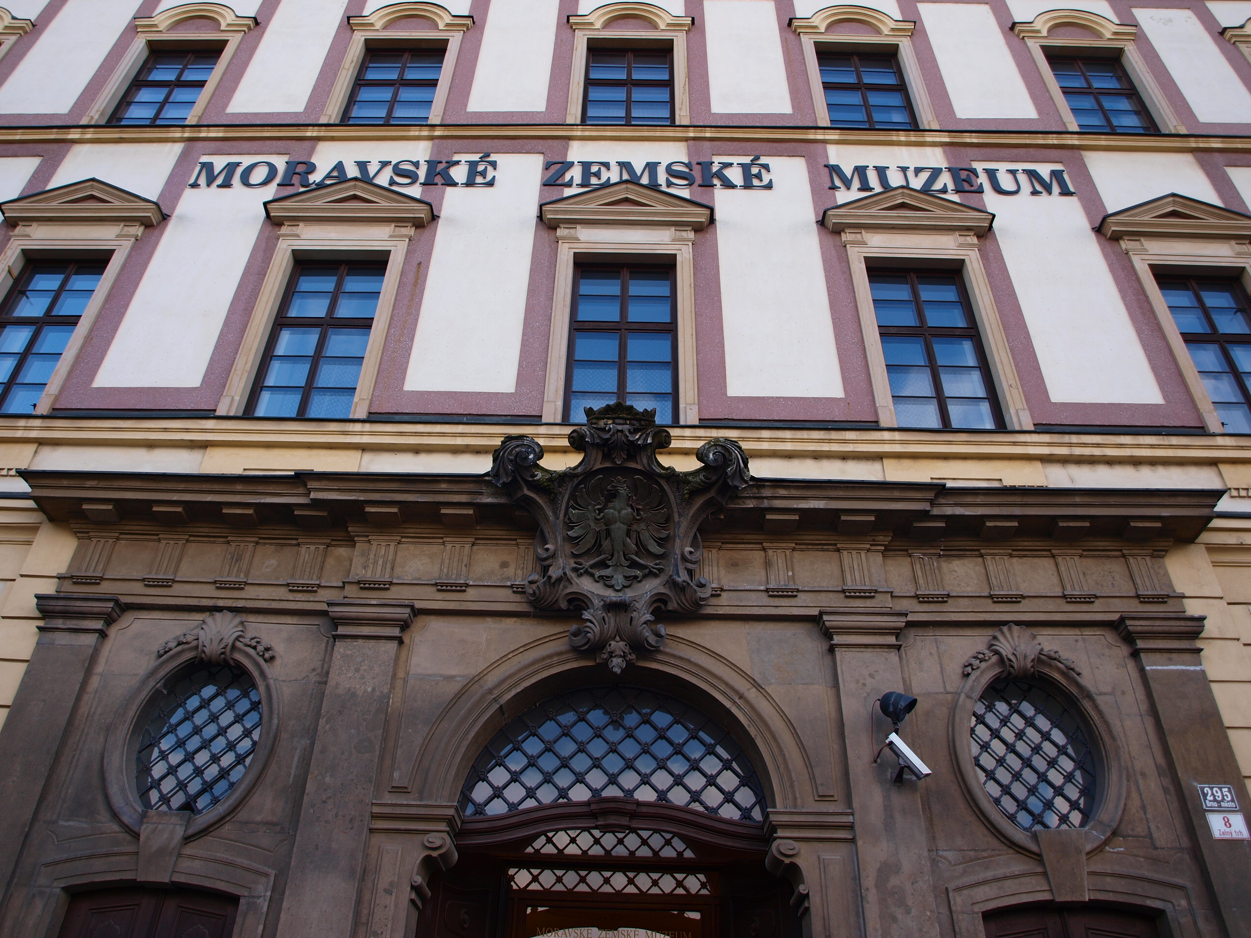 Dietrichsteinský palác, Brno